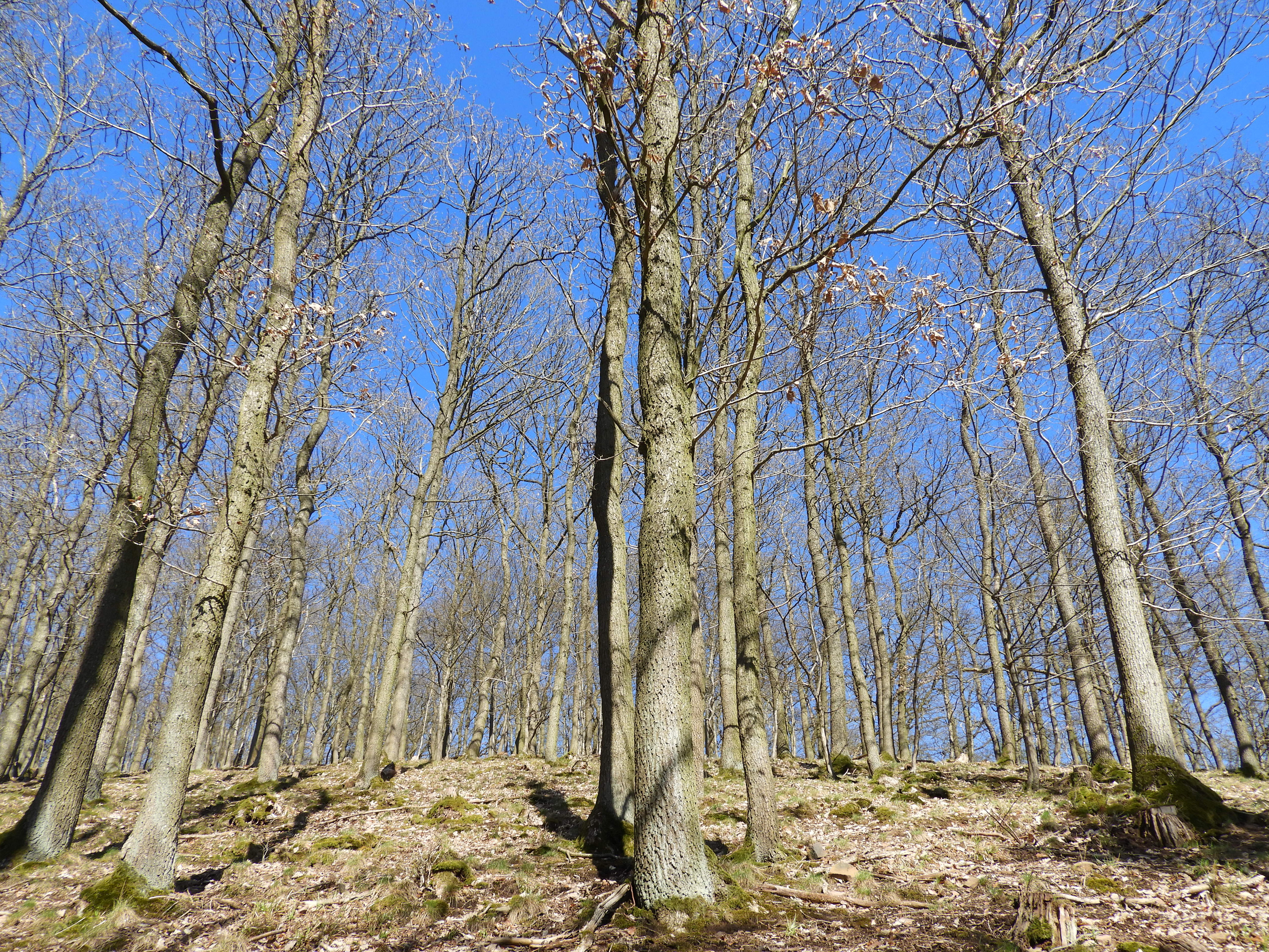 Die Kuppe des Eichenberges besitzt einen naturnahen Eichenwald, der reich an Alt- und Totholz sowie Höhlenbäumen ist. Der "Eichenberg bei Frieda" ist eine 300,5 m hohe Erhebung östlich von Frieda und westlich von Wanfried im nordhessischen Werra-Meißner-Kreis. Wegen seiner Bedeutung als schutzwürdiger Lebensraum für seltene Arten wurde er in 1997 als Naturschutzgebiet ausgewiesen und seit 2008 gehört mit gleichen Gebietsgrenzen und Erhaltungszielen als Fauna-Flora-Habitat(FFH)-Gebiet mit der Nr. 4826-302 zum europäisch vernetzten Schutzgebietssystem Natura 2000.